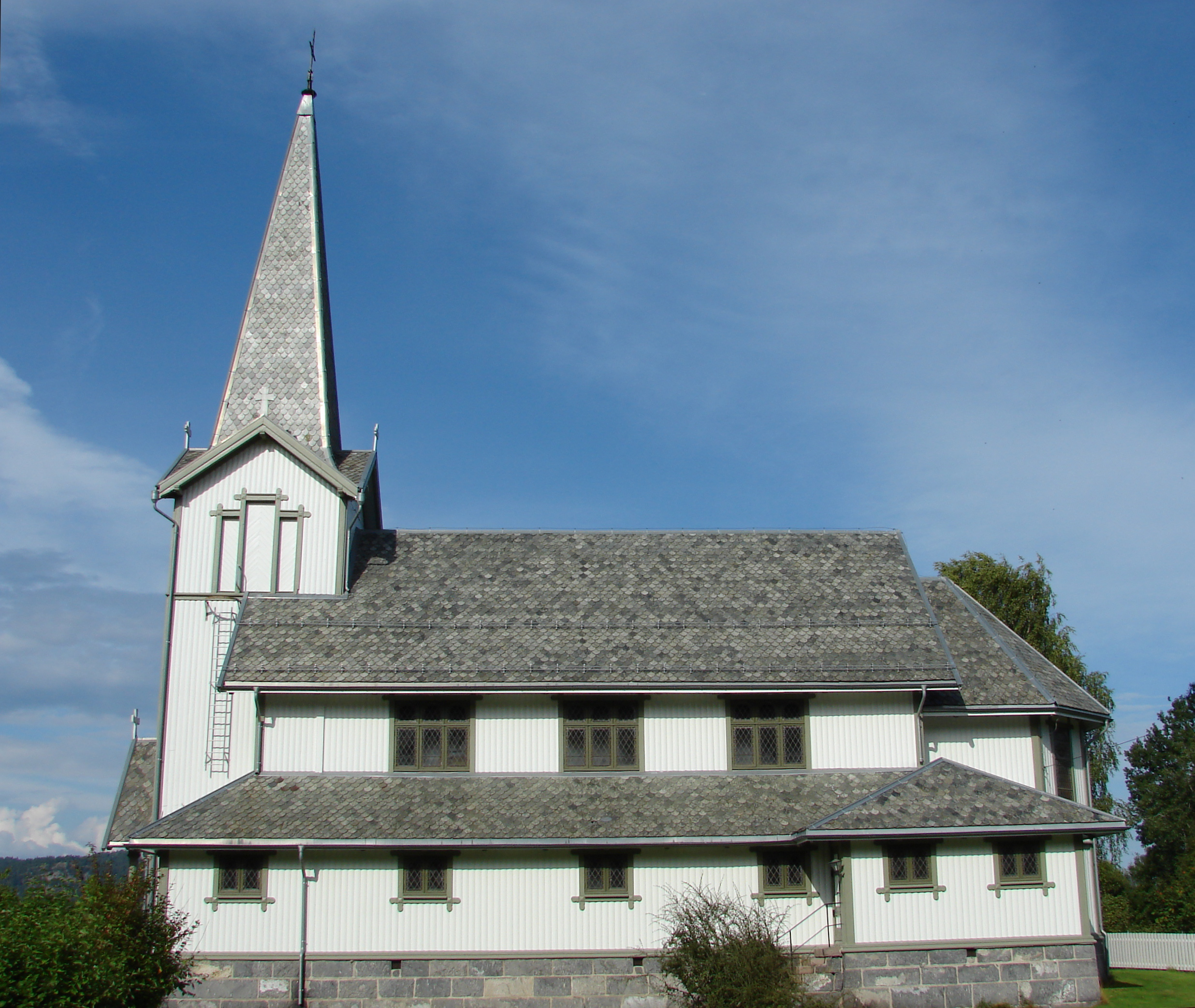 Herre kirke i Telemark